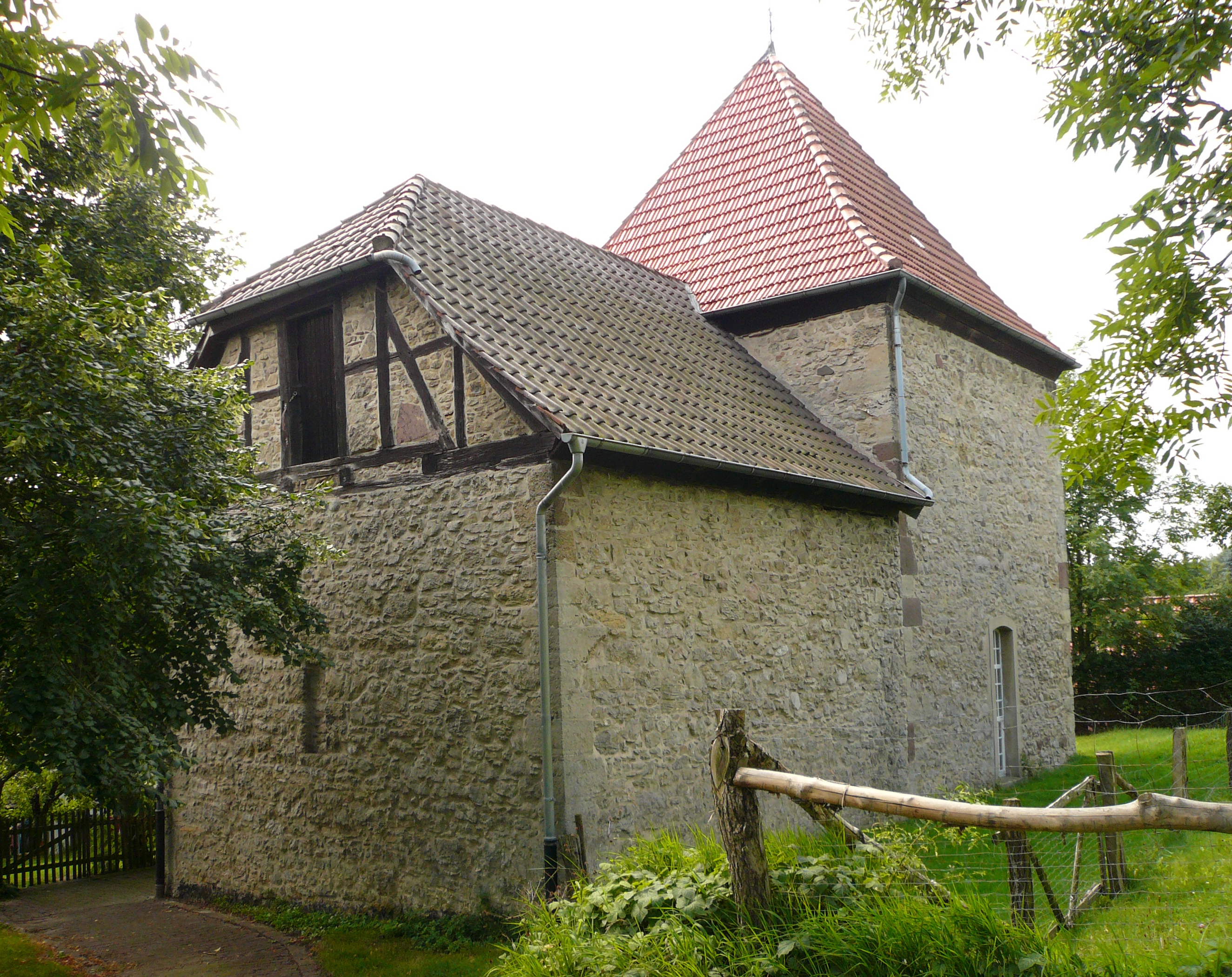 Ev.-luth. Kapelle in Bördel, Stadt Dransfeld, Niedersachsen. Im Kern offenbar mittelalterlich, heutiger Bau überwiegend aus der Zeit nach dem dreißigjährigen Krieg. (Quelle: Baudenkmale in Niedersachsen, Bd. 5.2, S. 133)